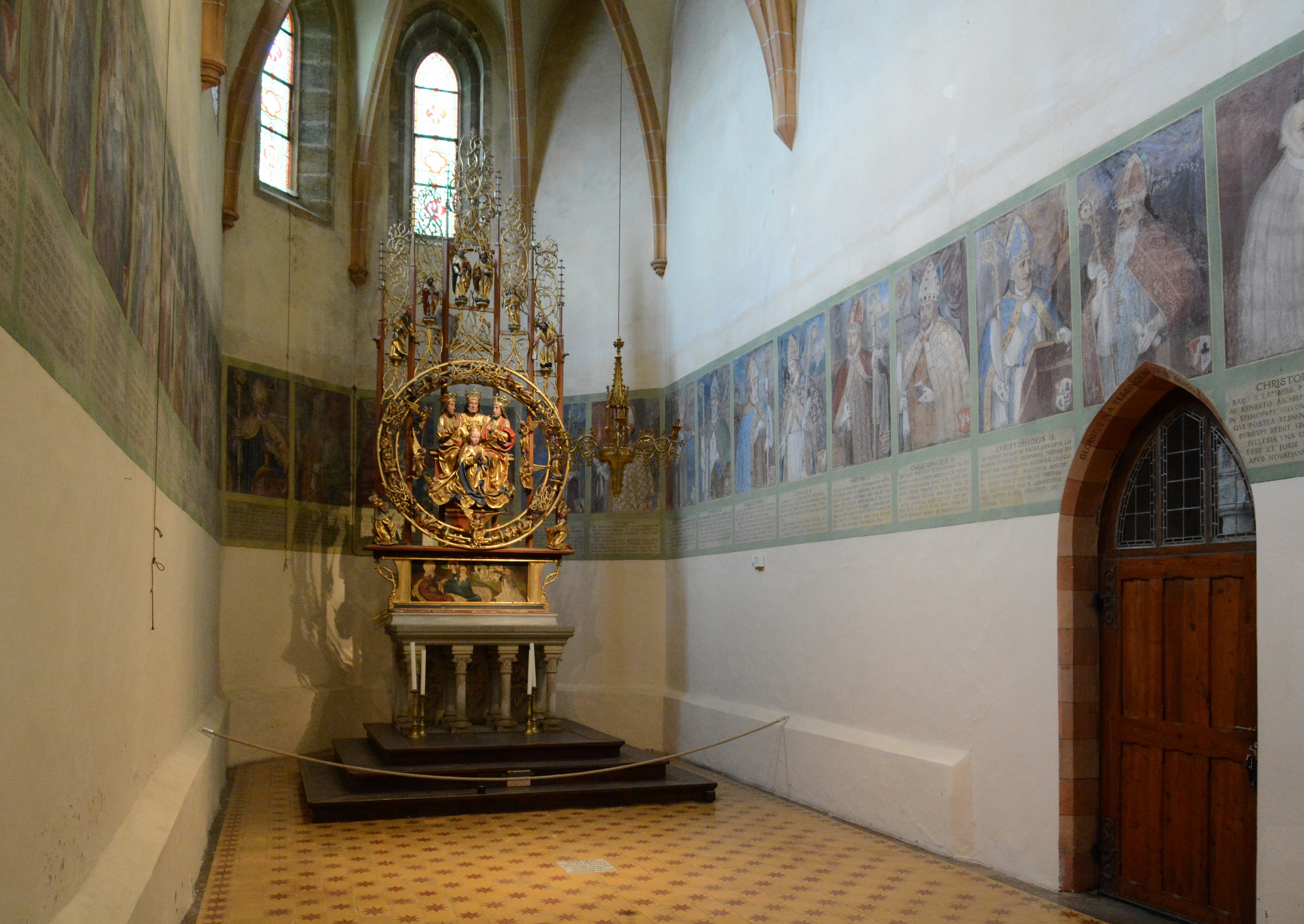 Basilika Seckau, Bischofskapelle